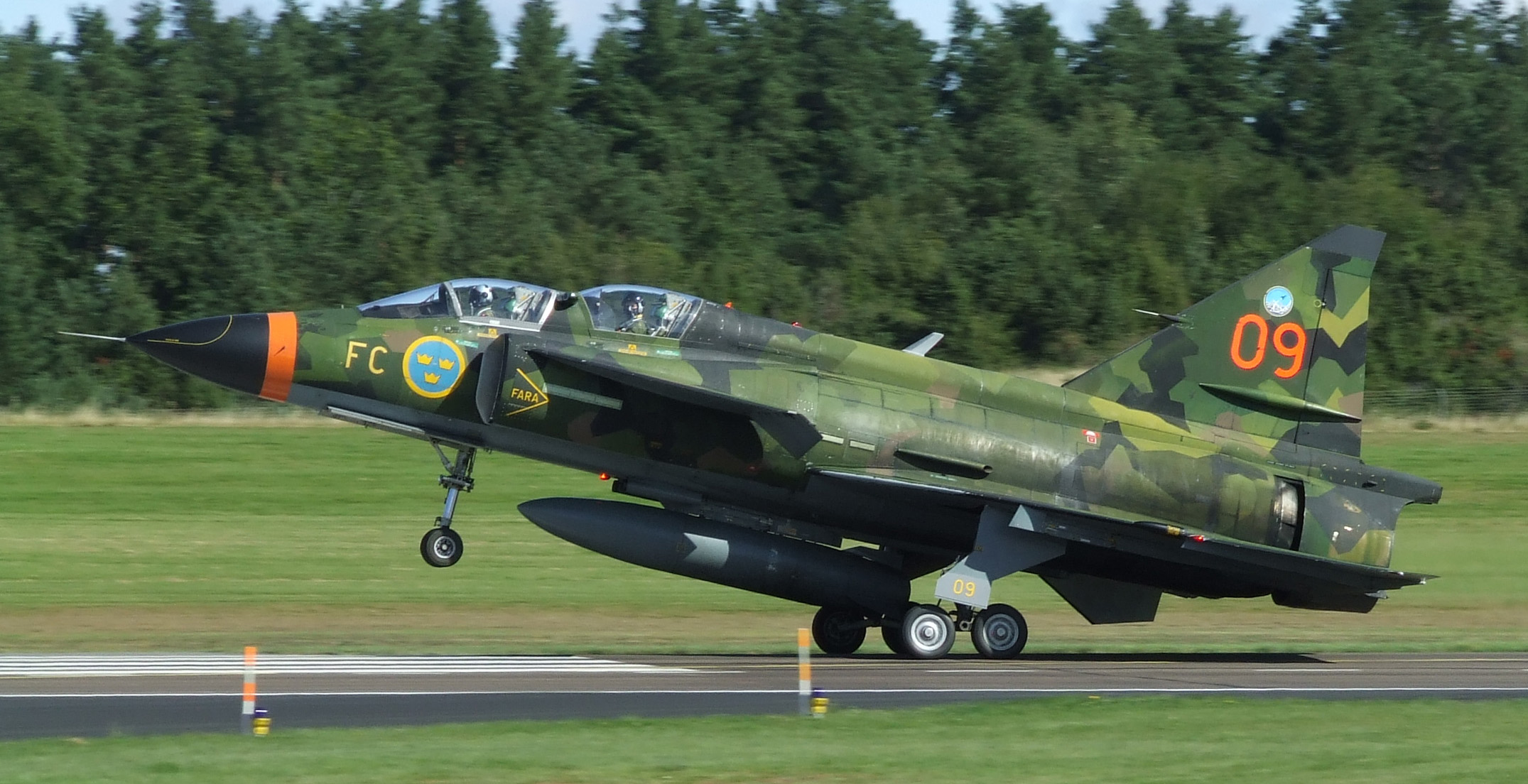 SK 37E Viggen, här tillhörande Försökscentralen (FC). Flygplanstypen levererades som SK 37 till Flygvapnet år 1976, och har tjänstgjort som utbildningsflygplan under olika perioder vid F 4, F 7, F 15, F 16 och F 21. Denna individ ingick i en grupp om tio flygplan vilka modifierades under perioden 1997-2000 till SK 37E Viggen, i syfte att ersätta J 32E som störflygplan. Flygplanstypen togs officiellt ur tjänst år 2005, men kvarstod vid Försökscentralen fram till 2007.